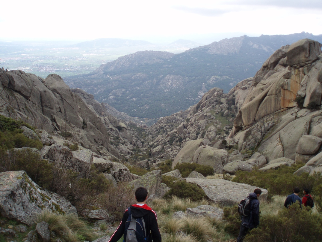 Hueco de las Hoces, en La Pedriza (Comunidad de Madrid, España).